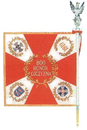 Nowy sztandar 2 Brygady Łączności przekazany jej w dniu 29 czerwca 1994 roku. Zdjęcie pochodzi ze strony